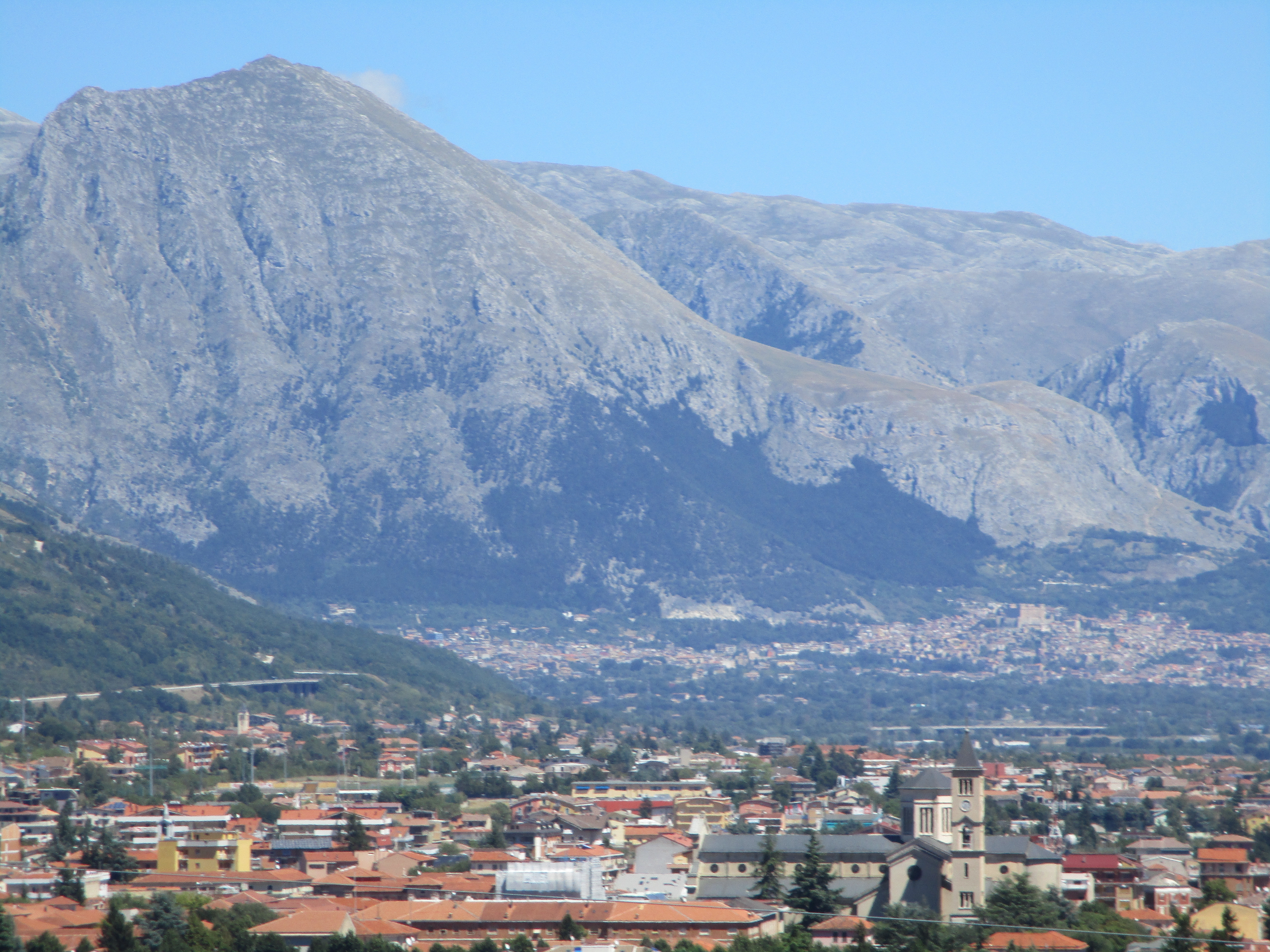 Panoramica di Avezzano